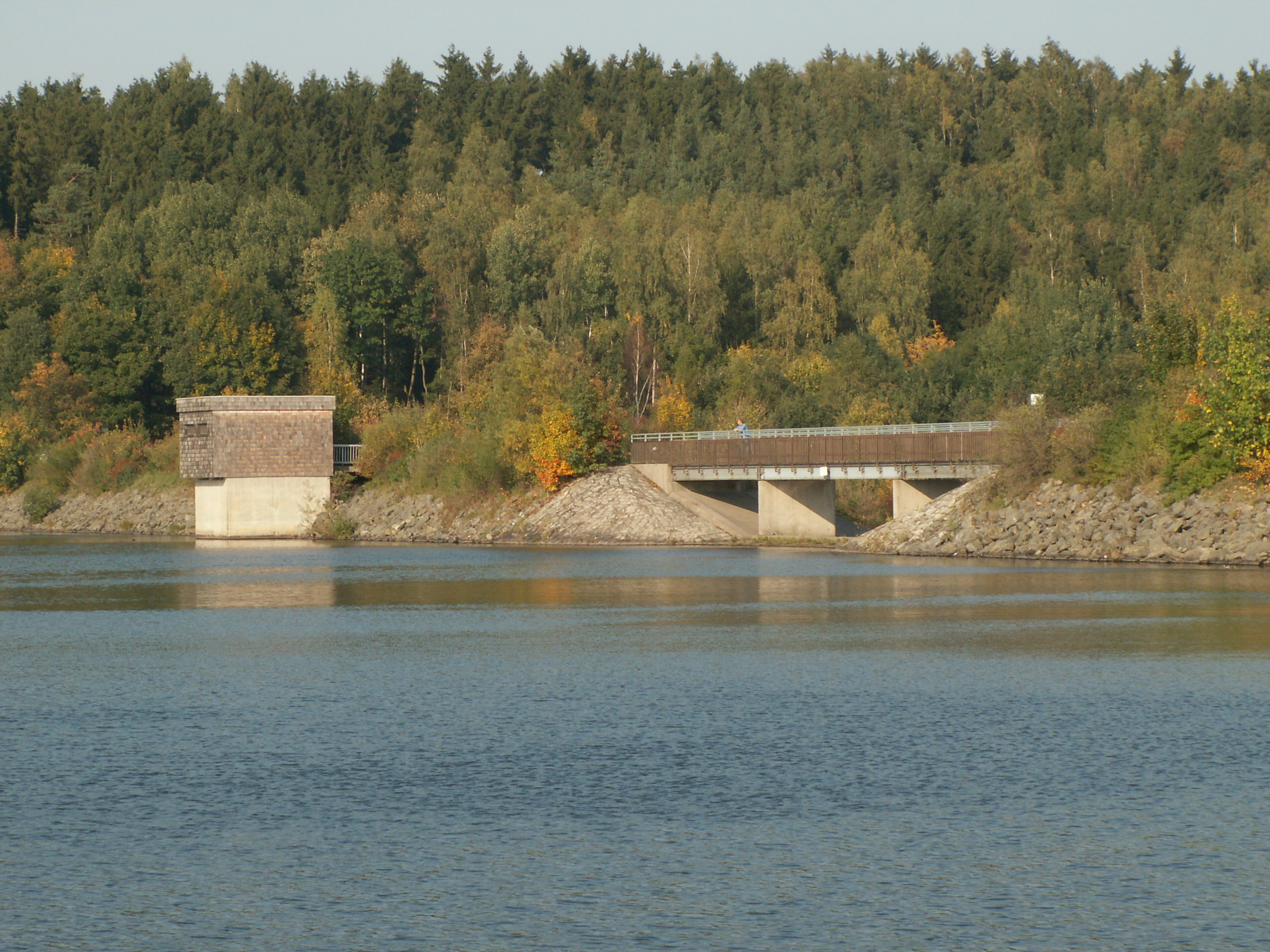 Staudamm des Untreusee in Hof(Bay)